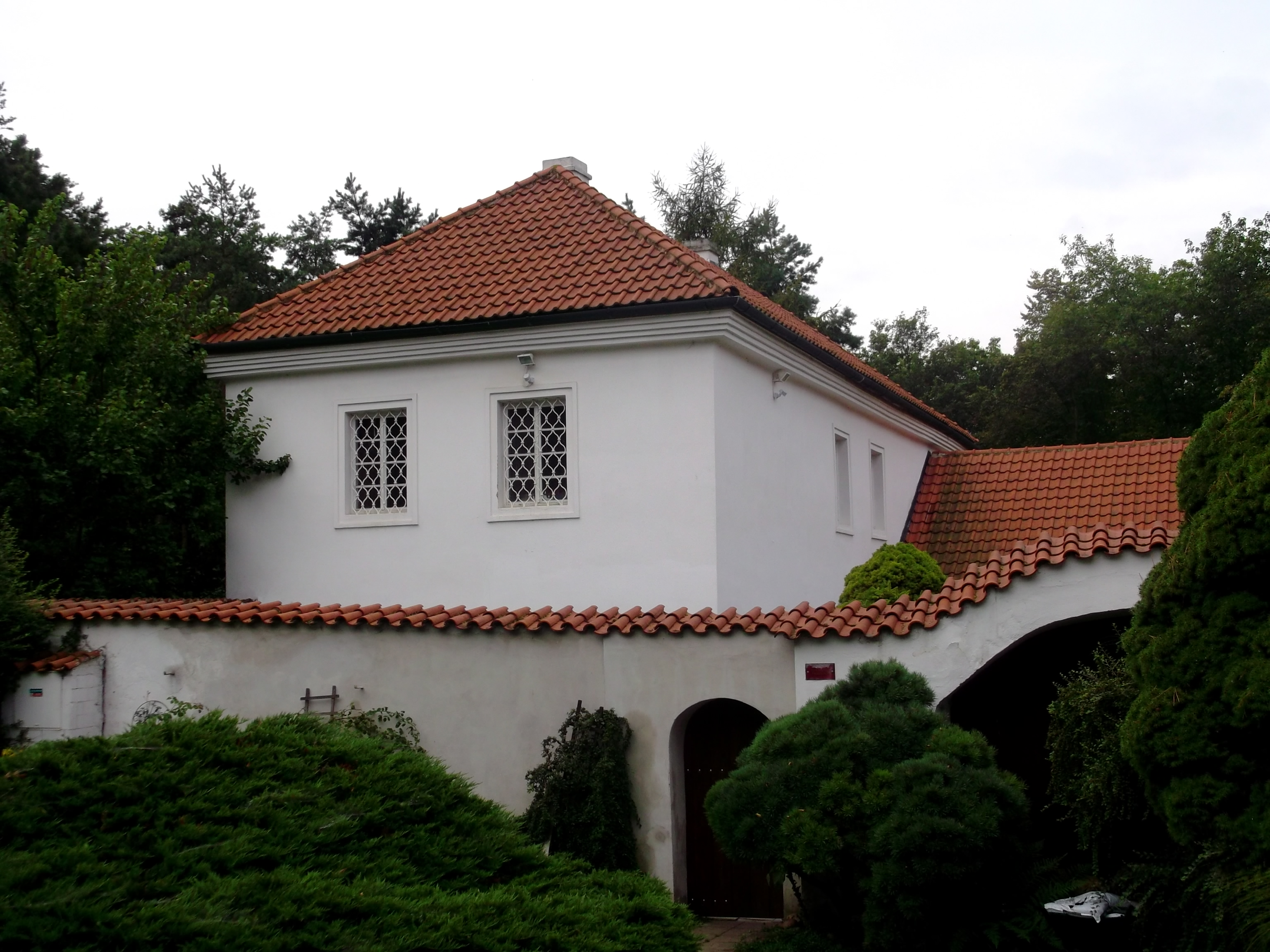 Usedlost Císařská, Praha 8-Libeň, Prosecká 76/32